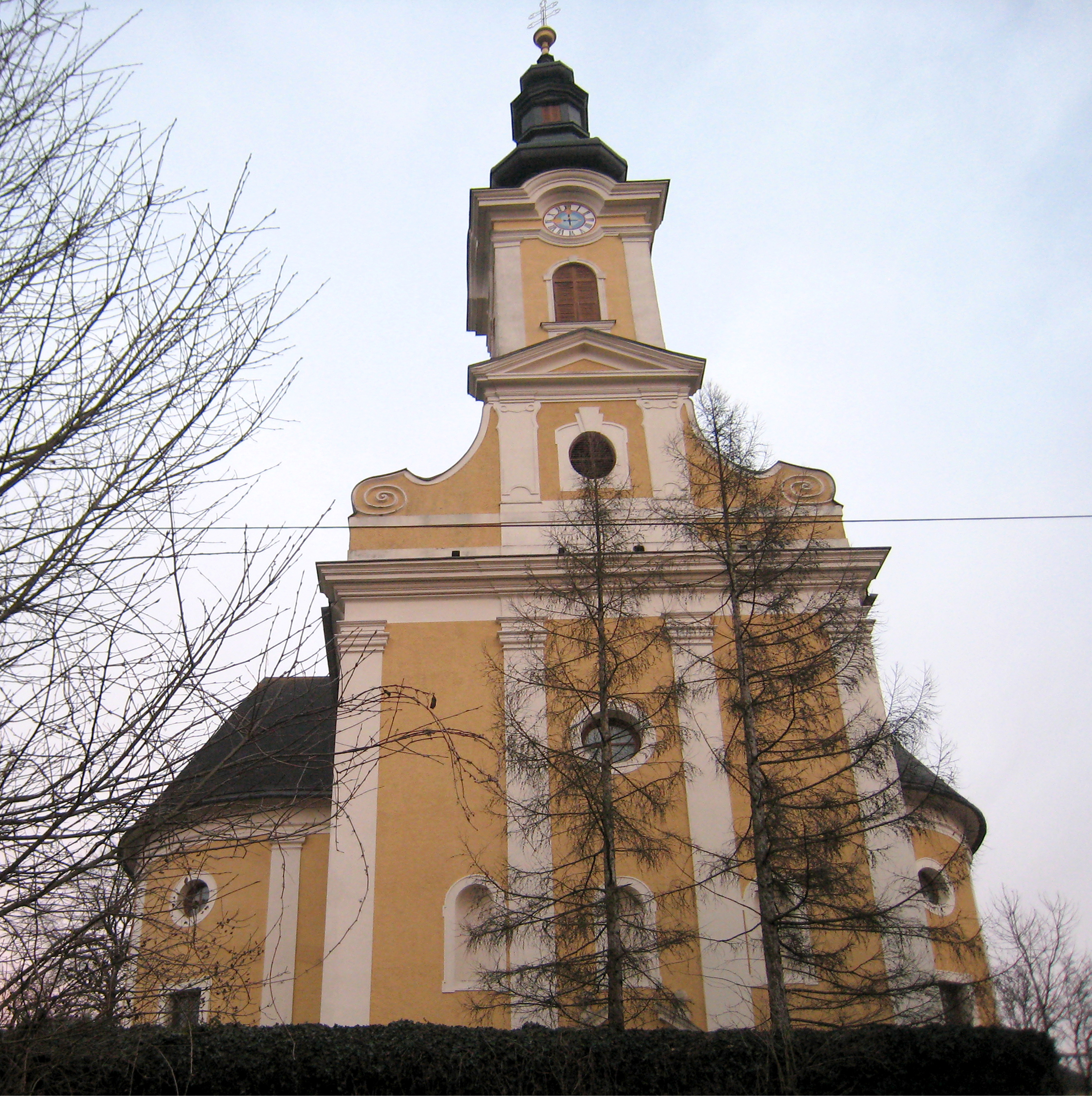 Kath. Pfarrkirche hl. Leonhard